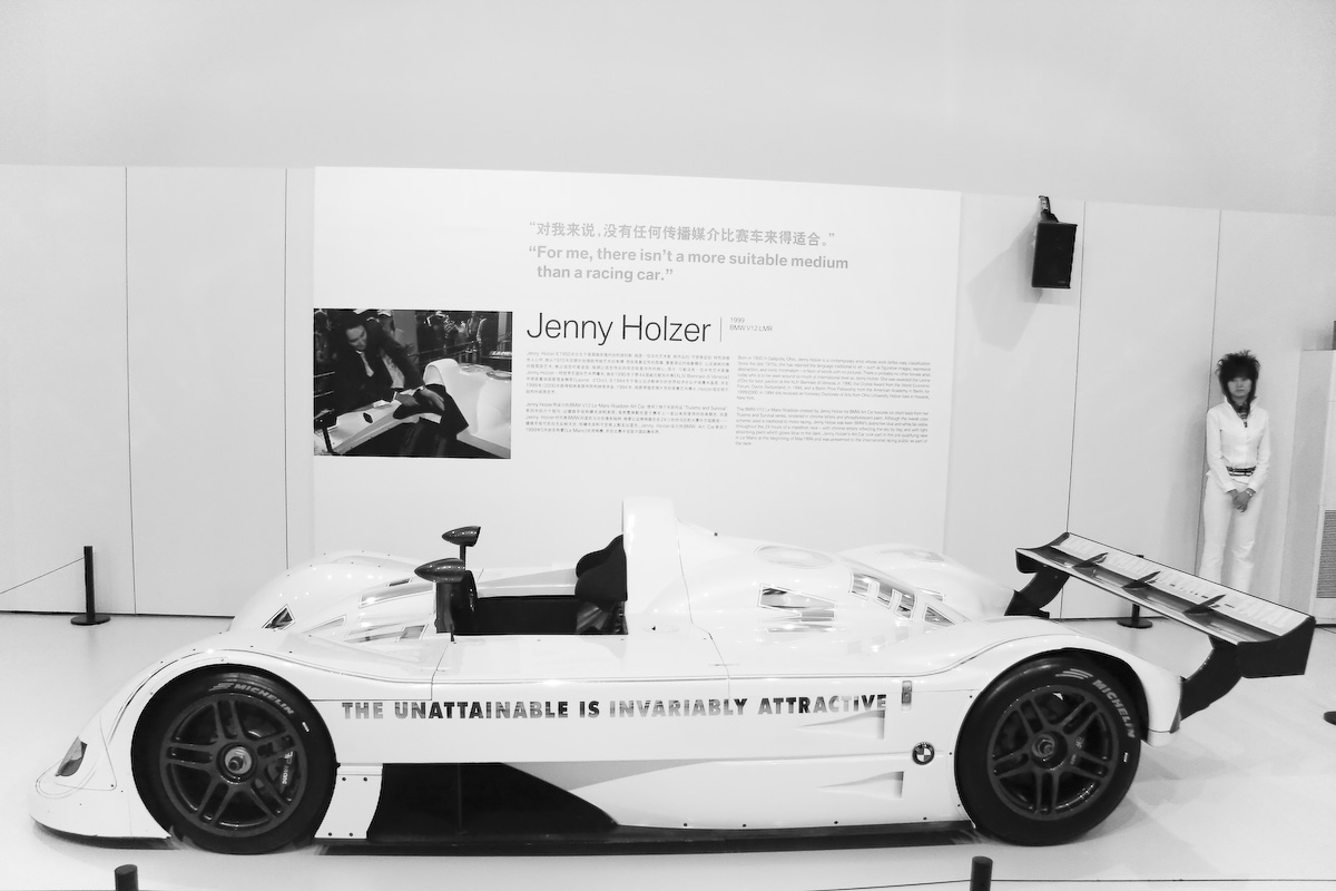 Jenny Holzer创作的1999 BMW V12 LMR。